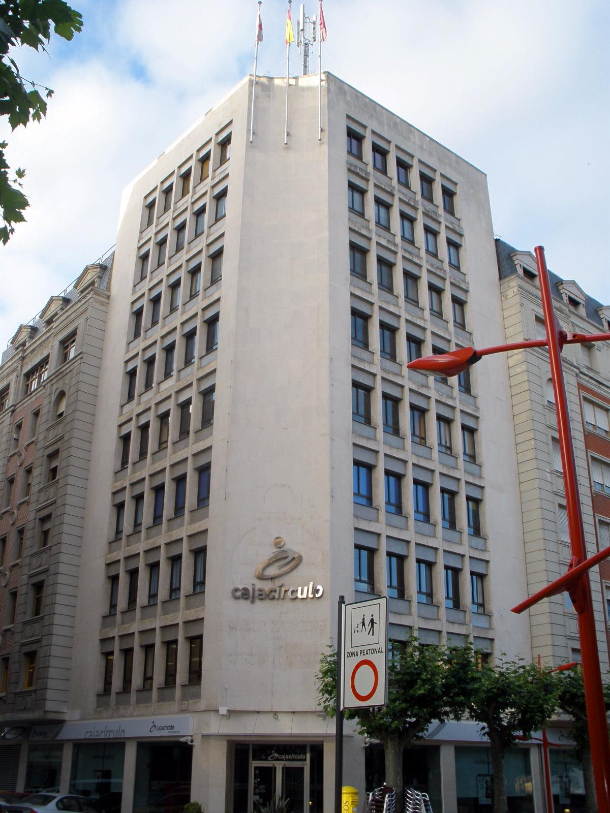 Edificio Caja Círculo en Miranda de Ebro (Burgos, Castilla y León, España)